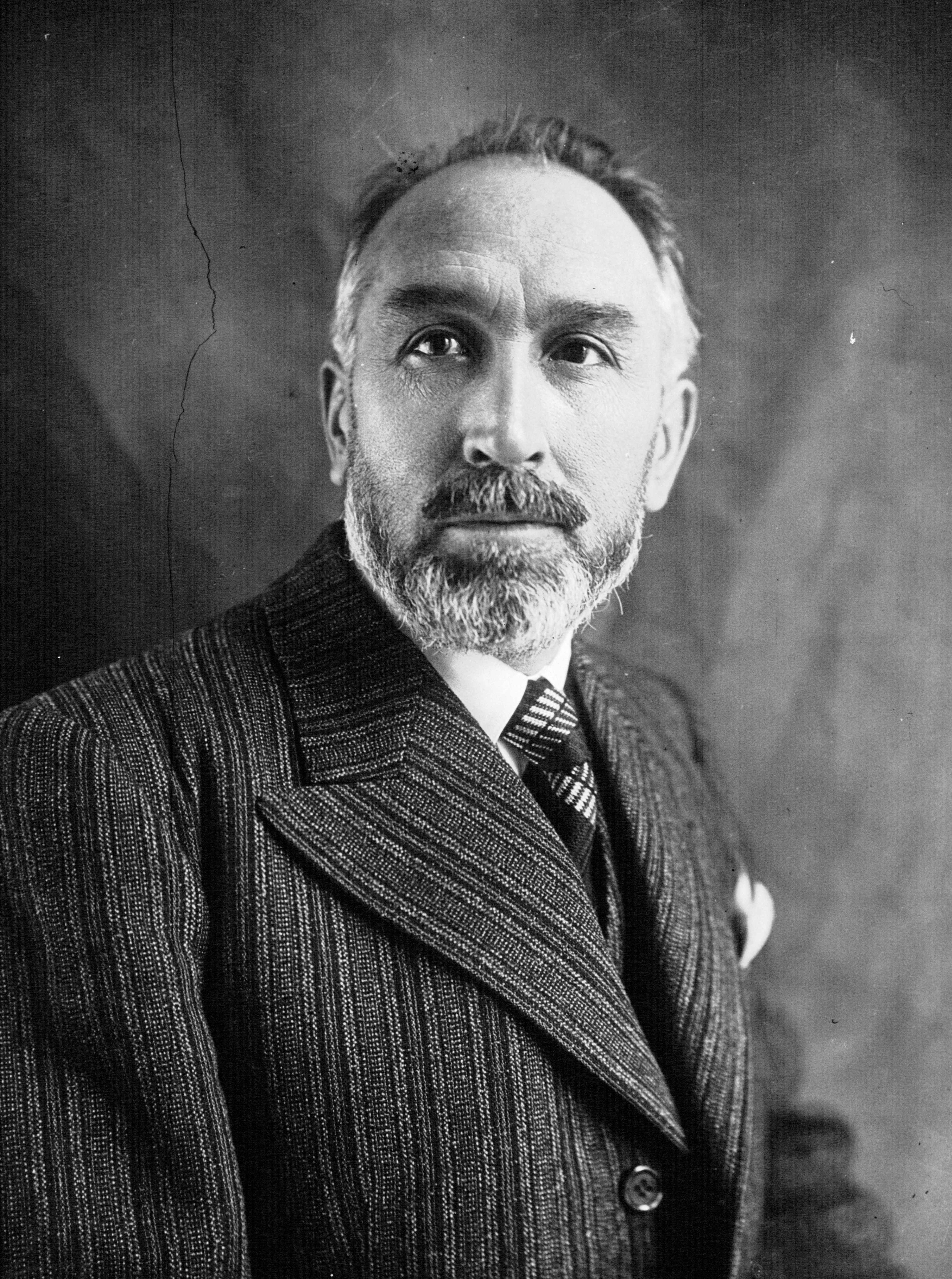 Max Dormoy, député de l'Allier : photographie de presse